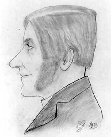 Anders Petter Andersson, även känd som Ljurskamjölnaren